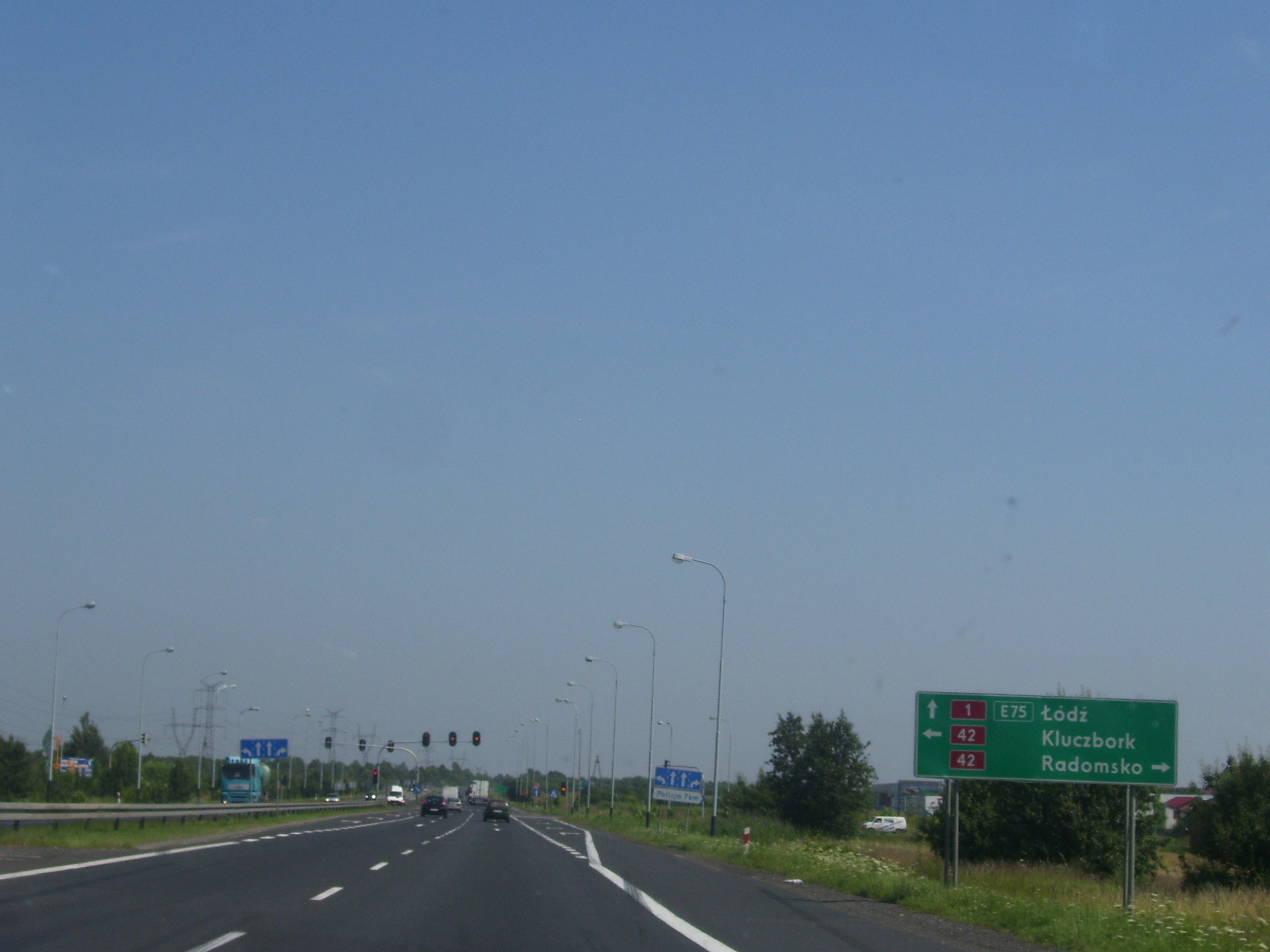 Silnice č. 1. v Polsku nedaleko Radomska